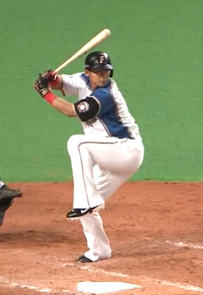 2015年フォーム